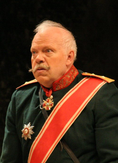 Актёр Александр Потапов. В роли Чубукова в спектакле «Свадьба, свадьба».